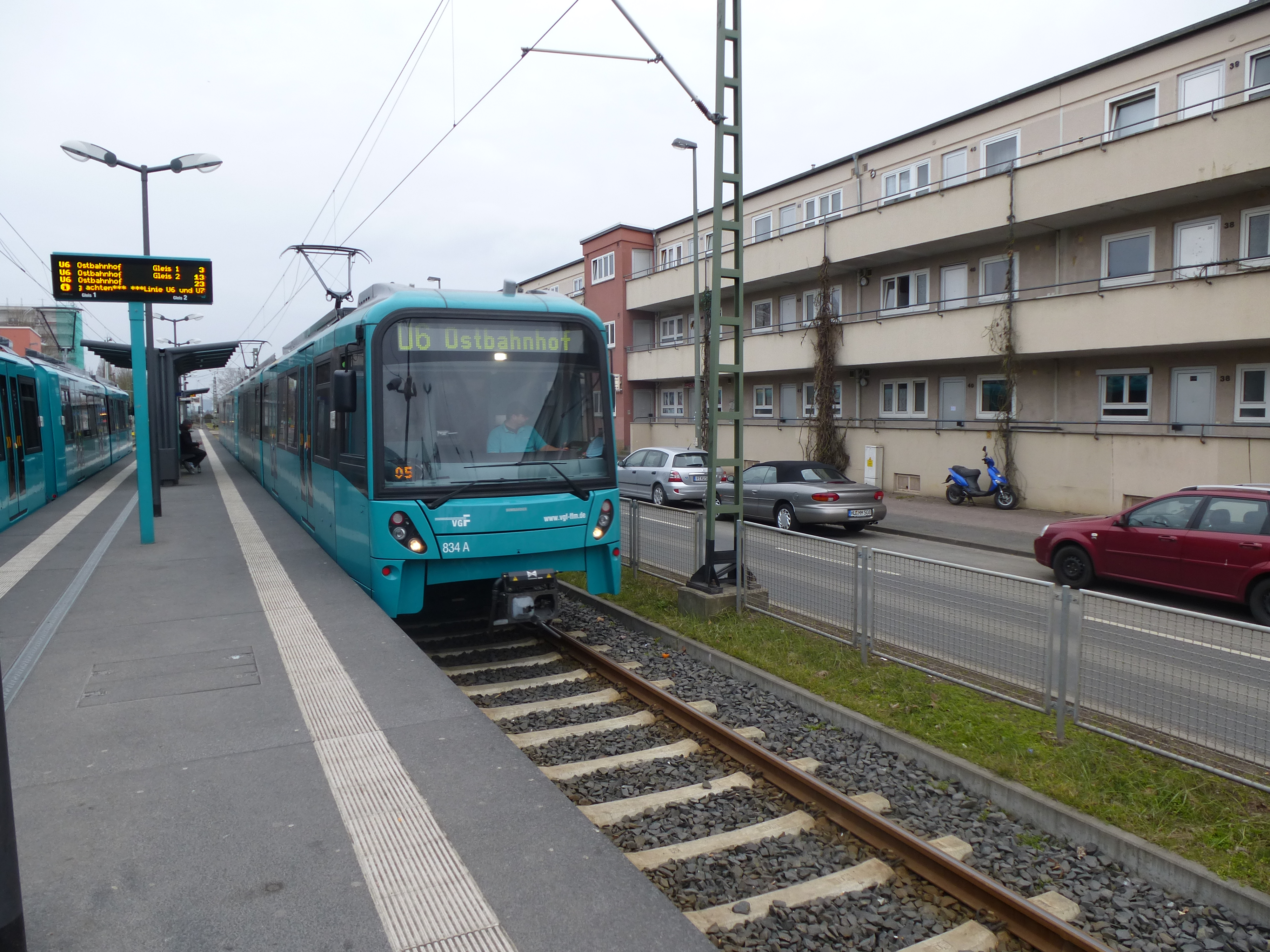 Hier ein neuer U5-Triebwagen auf der U6 an der Heerstraße.